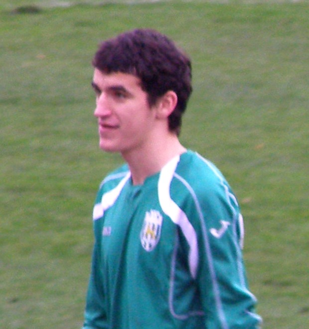 Український футболіст Олег Тарасенко у барвах "Карпат"